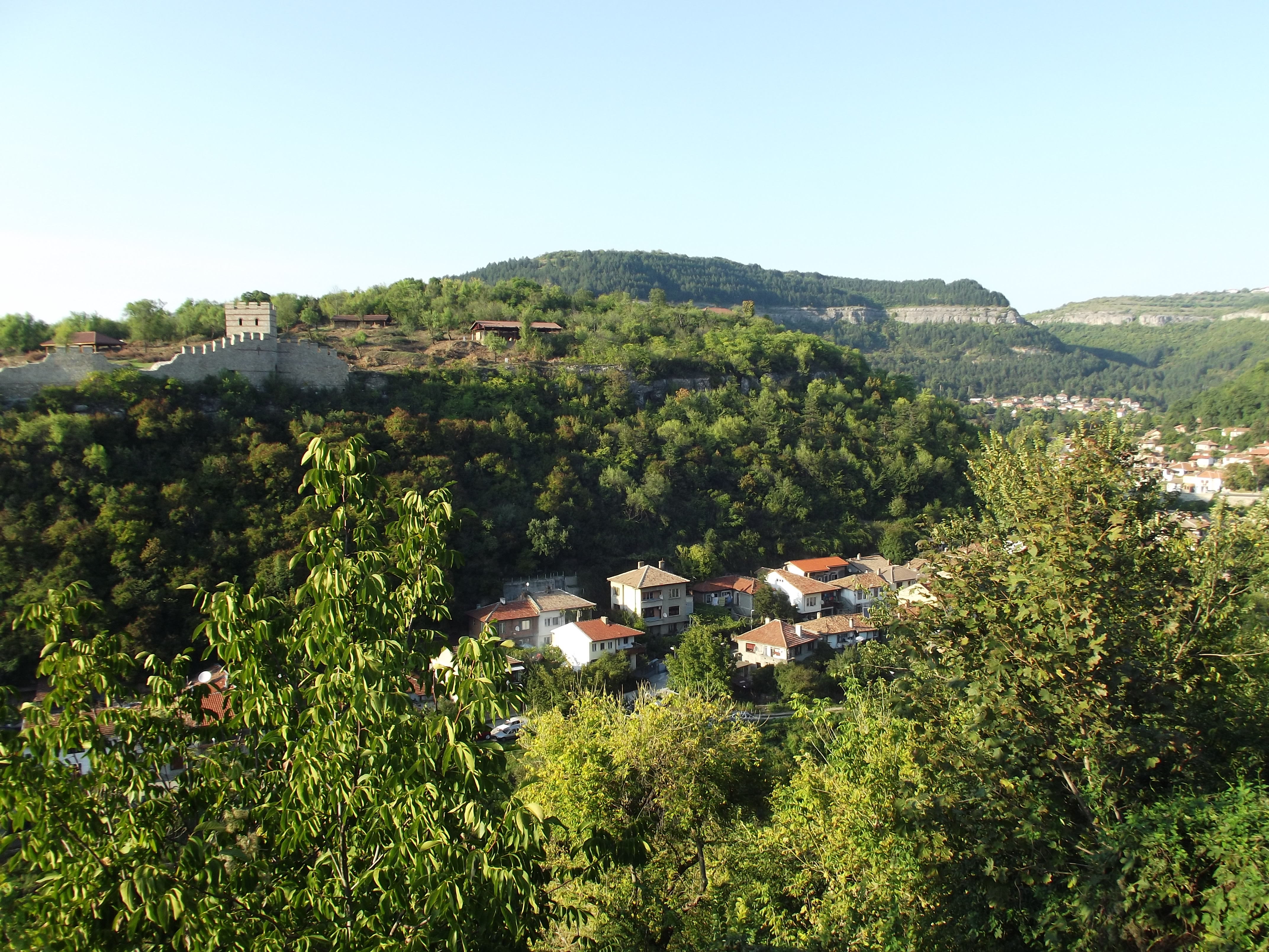 Трапезица е хълм, намиращ се в близост до Велико Търново. Тя е втората крепост на вътрешния град на Средновековен Търновград (Велико Търново). Намира се на десния бряг на р. Янтра, северозападно от Царевец. Представлява естествена крепост, заобиколена от трите си страни от реката. Вижда се реставрирана бойна кула.